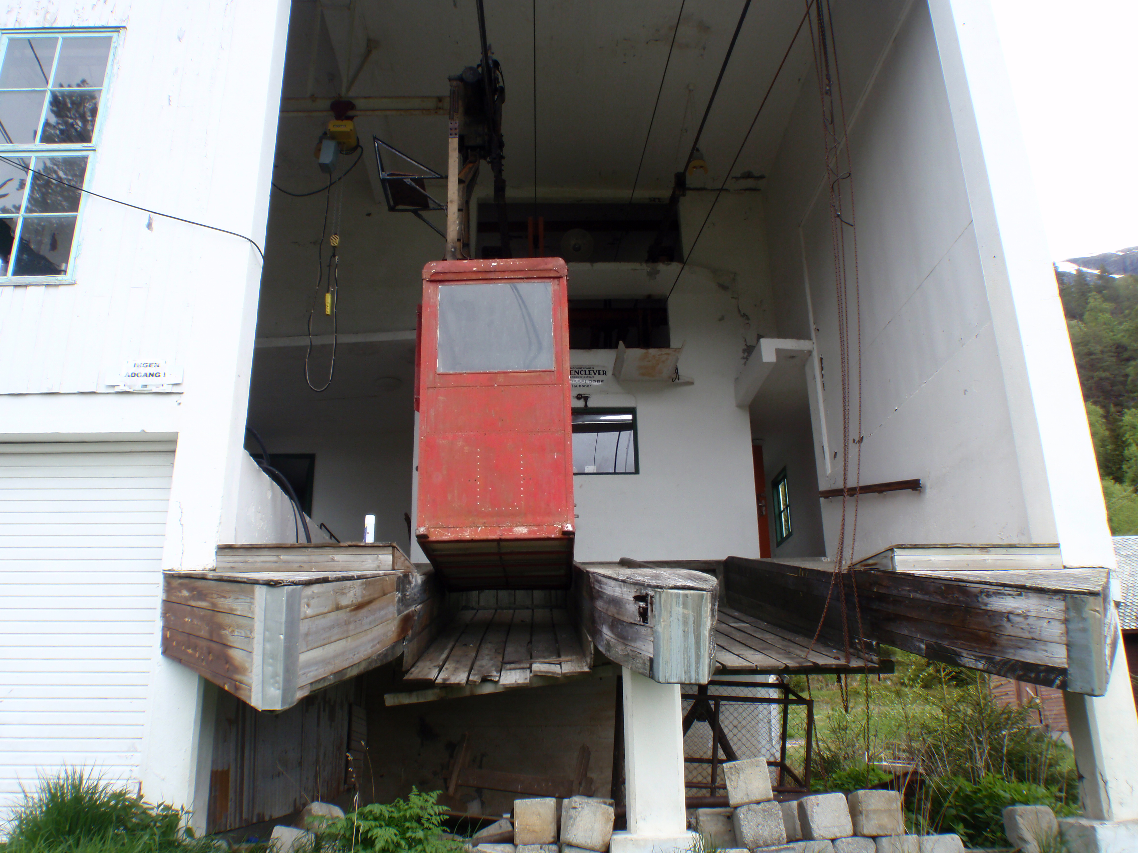 Øvste stasjon på gondolbanen til Harastølen i Luster i Sogn